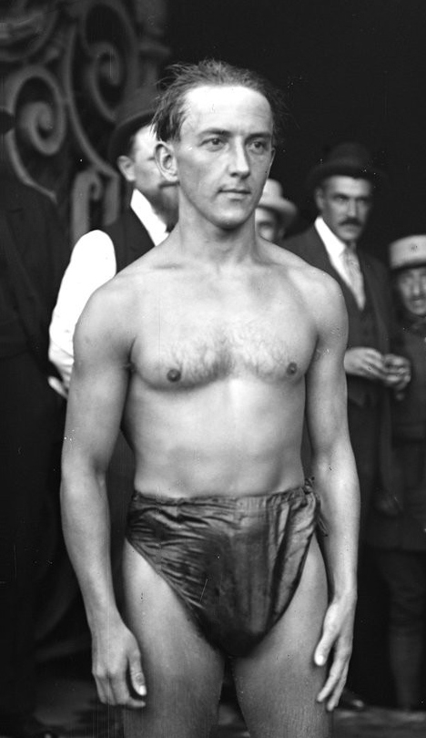 25/7/20, [Henri] Duvanel, gagnant de la traversée de Paris [à la nage] : [photographie de presse] / [Agence Rol]